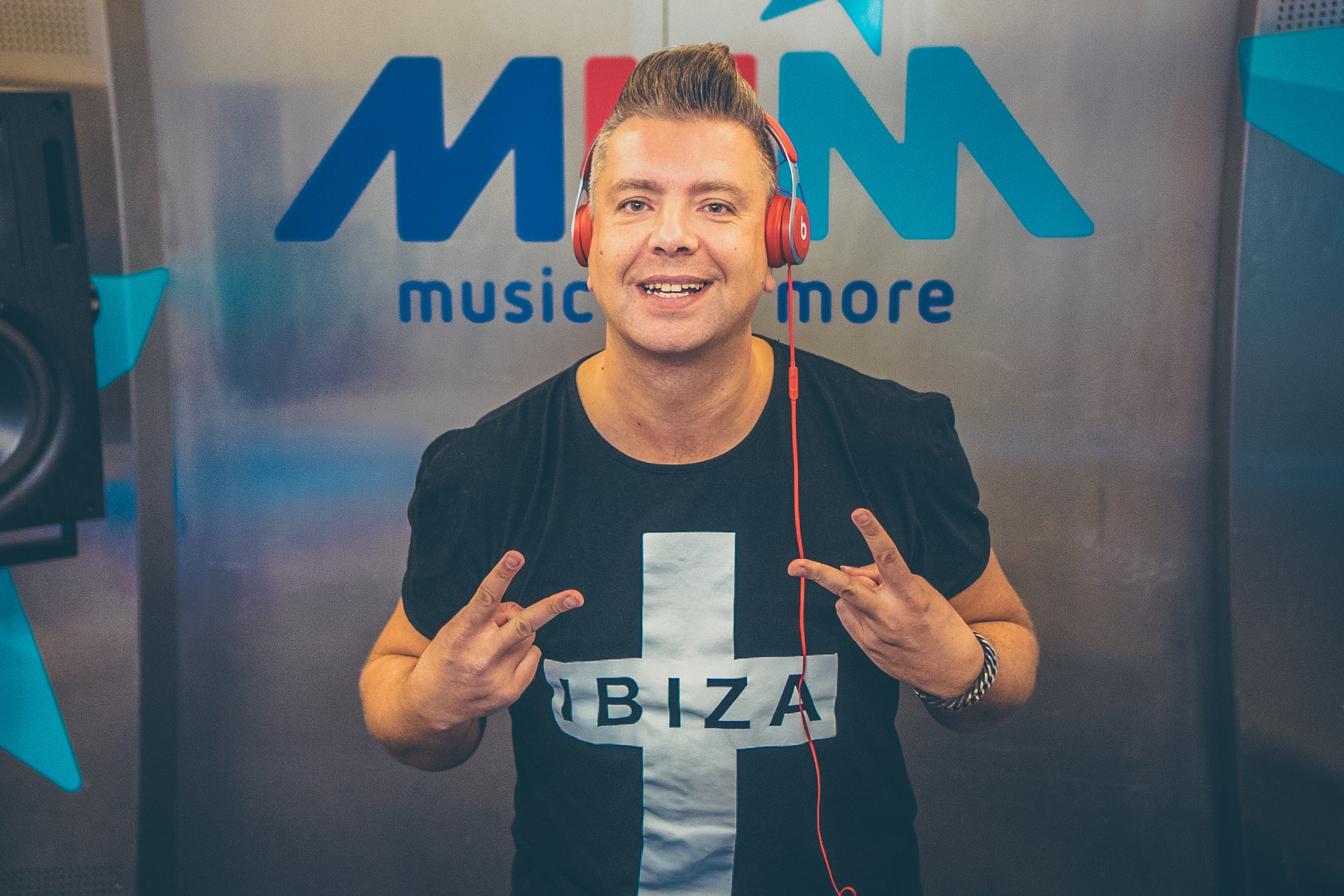 DJ Wout bij MNM